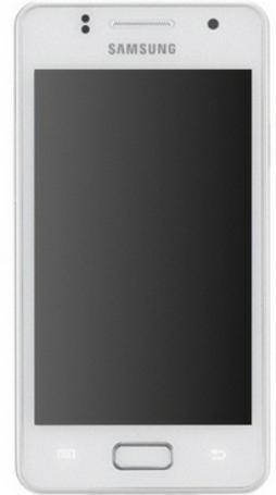 갤럭시m스타일 화이트